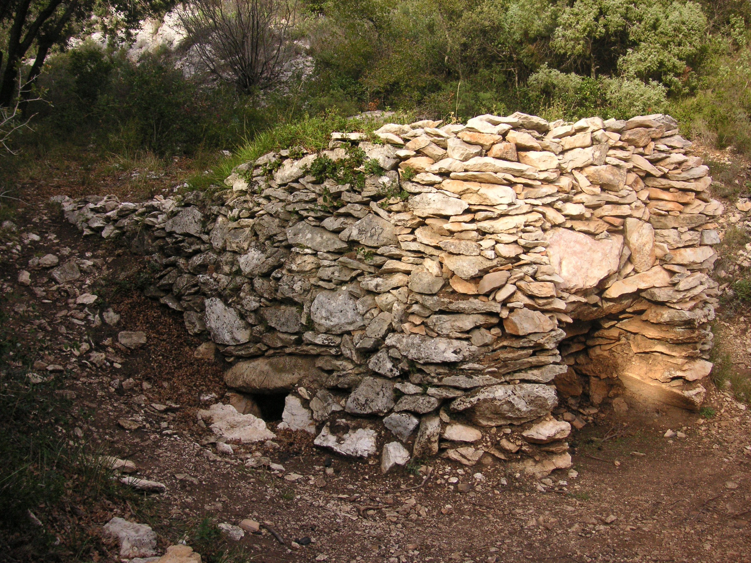 Four à cade de profil, Var, France. Source: La Cigale